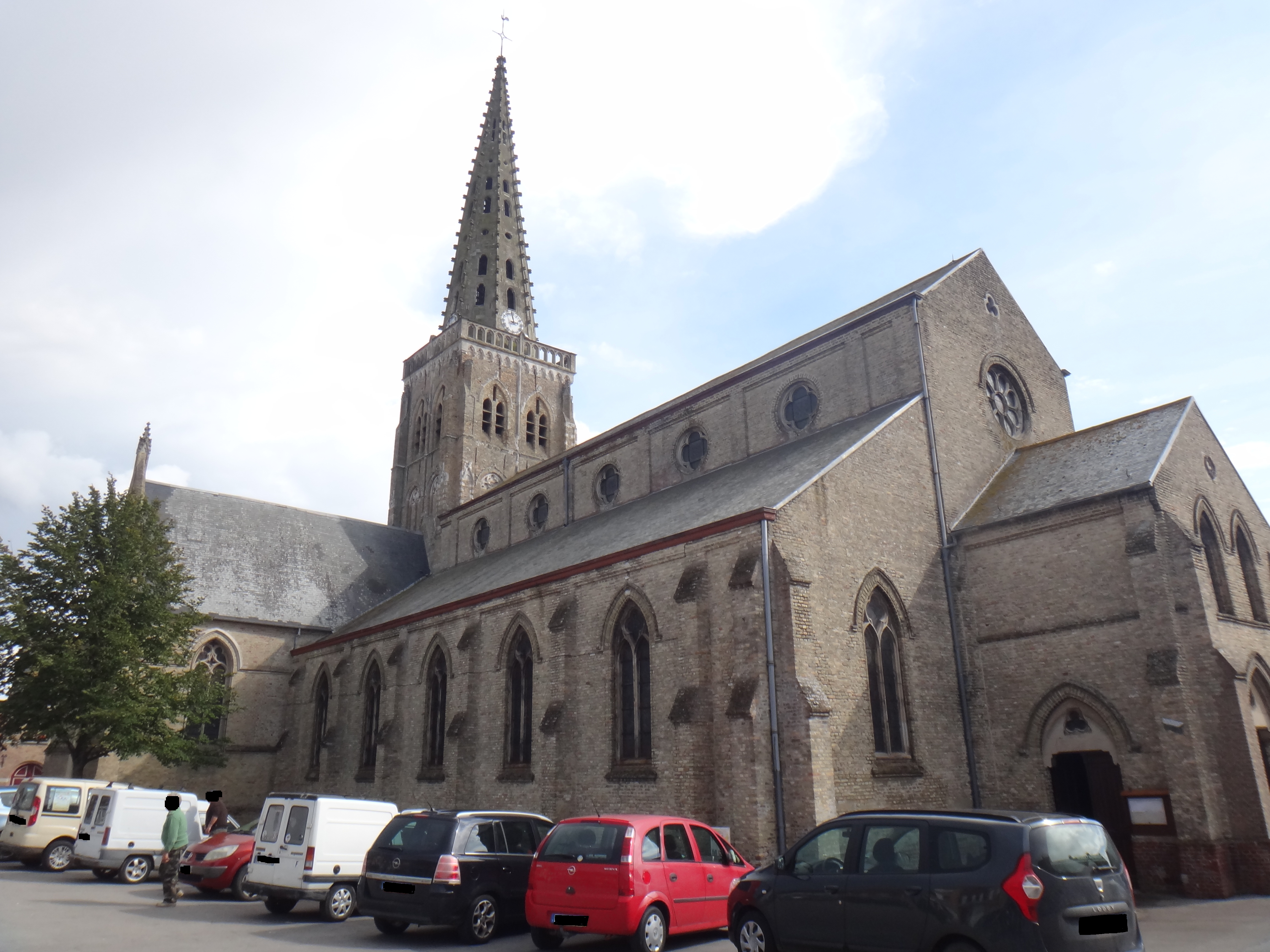 Église de Bollezeele (Saint Wandrille). XIXe siècle. Architecte : Auguste Outters